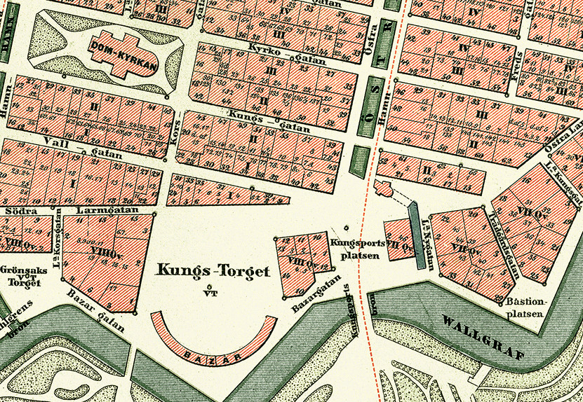 Bilden visar kvarteret Idogheten i stadsdelen Inom Vallgraven i Göteborg år 1888. Kvarteret syns i mitten av kartan, norr om Kungstorget, söder om Vallgatan och öster om Korsgatan, och är triangelformat.